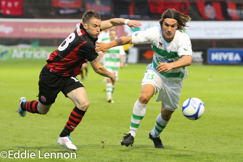 Bohemians V Olimpija Ljubljana (33 of 37)